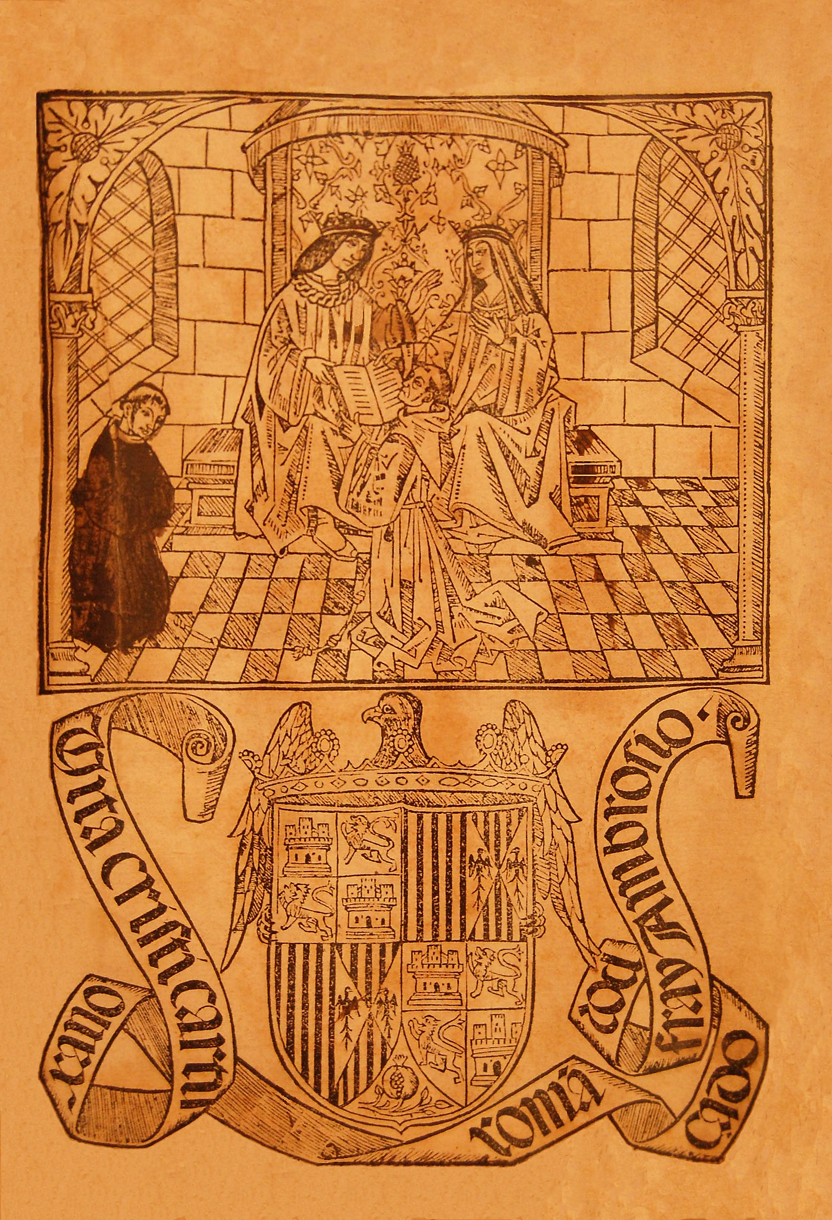 Portada del libro "Vita Christi cartuxano" de Ludolphus de Saxonia (Ludolfo de Sajonia) y traducida a lengua romance por fray Ambrosio Montesino. Esta fue la primera obra impresa en Alcalá de Henares, el 22 de noviembre de 1502.[1] "La composición está dividida en dos partes: la inferior, que ostenta el escudo unificado de los reinos de España, sostenidos por el águila de los Reyes Católicos, y una filacteria alrededor que dice «Vita Cristi cartuxano româçado por fray Ambrosio»; y la parte superior, que representa una escena enmarcada por columnas, en la que aparecen los Reyes Católicos bajo un dosel, recibiendo el libro de manos de un franciscano arrodillado ante ellos, mientras que otro fraile más joven permanece a la izquierda, asistiendo a la escena reverencialmente, con las manos ocultas en el hábito. Este último personaje es probablemente Ambrosio Montesino, el autor del libro, y el que se arrodilla ante los reyes es seguro el Cardenal Cisneros." [2]